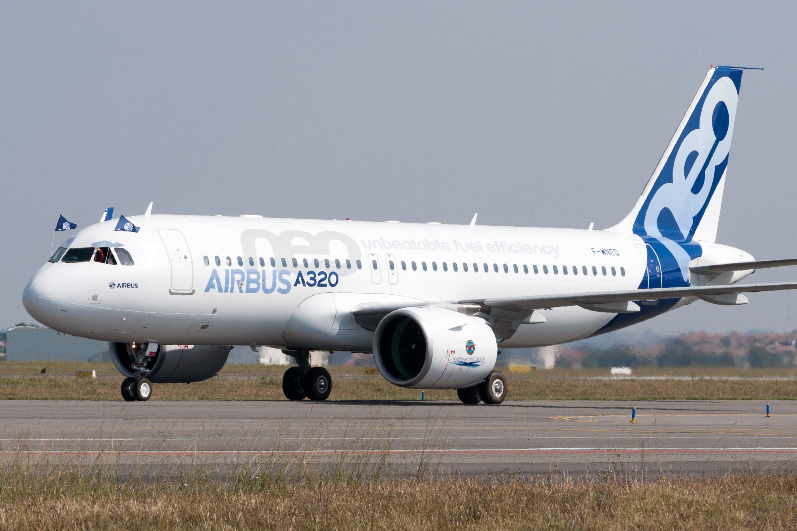 Atterrissage de l'A320neo après son premier vol